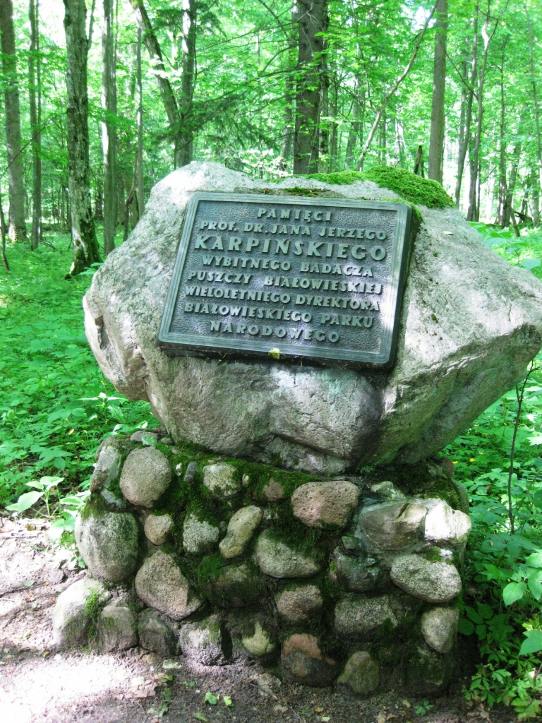 Հուշաքար Բելովեժյան անտառում